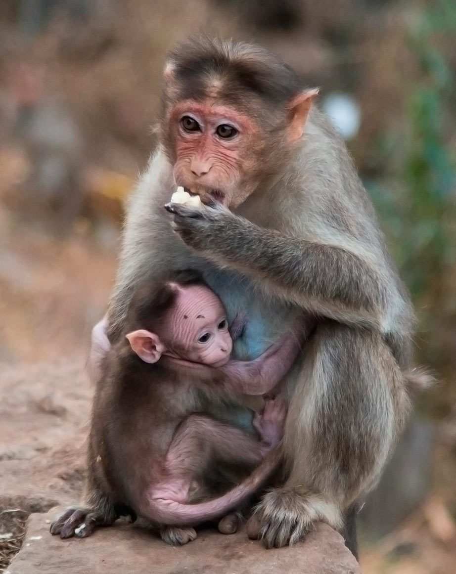 Индийский макак